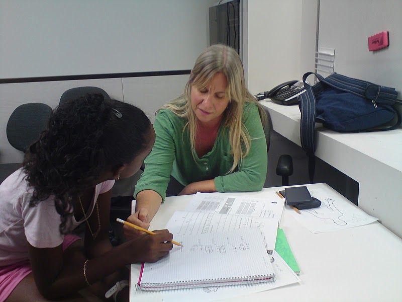 חניכה בת העדה האתיופית ומתנדבת בפרויקט גמל"א